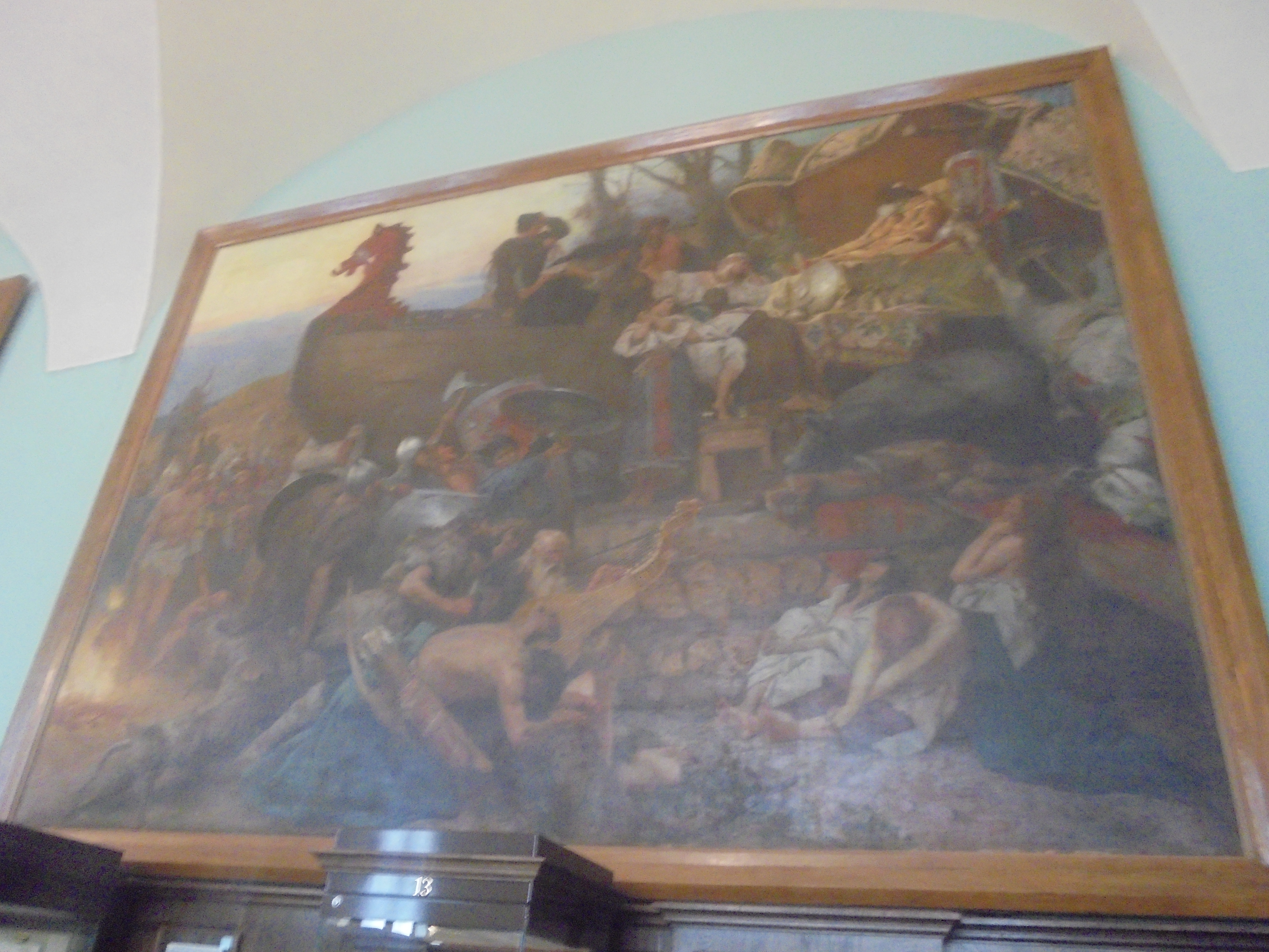 Картина